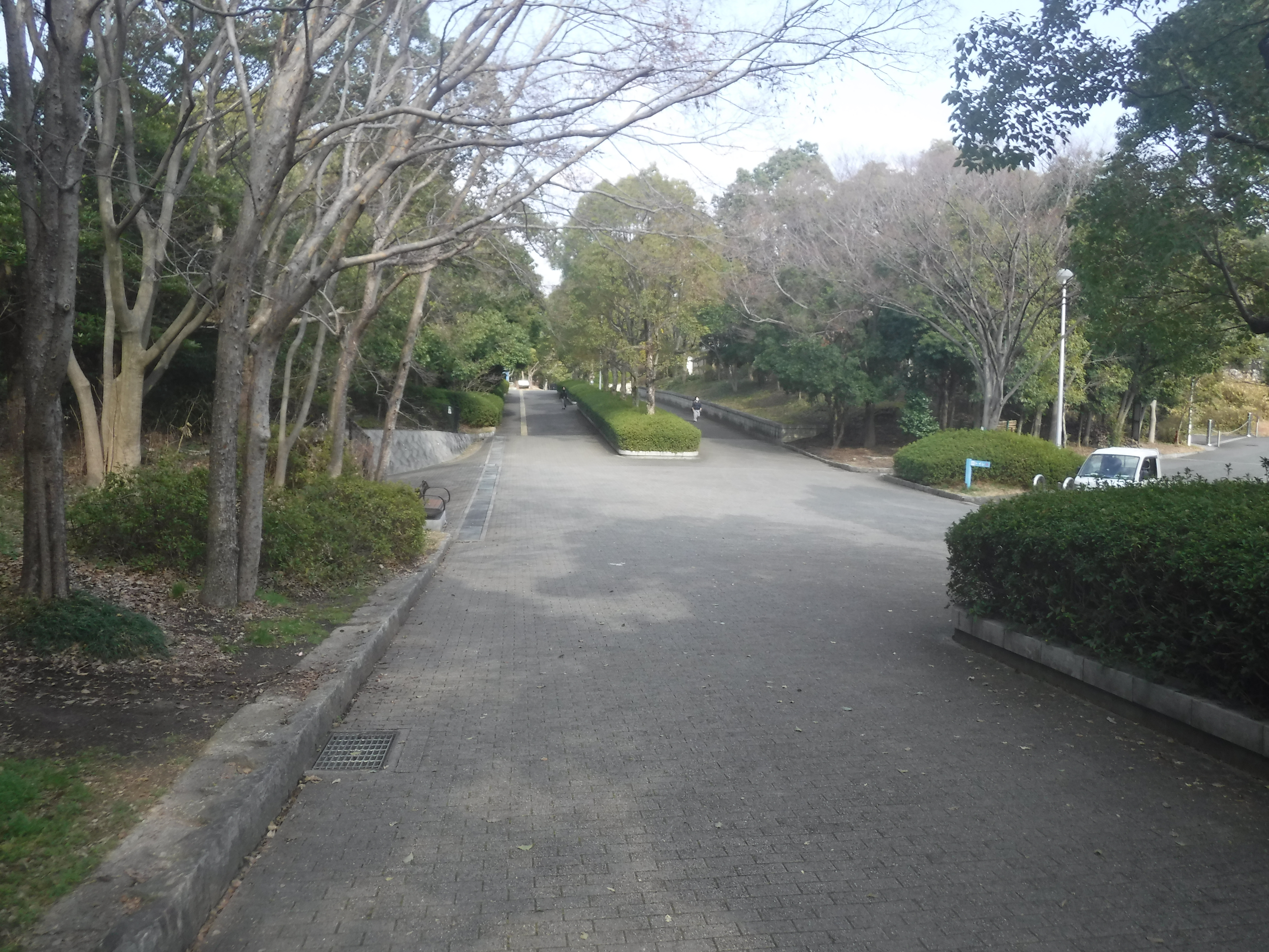 寝屋川公園